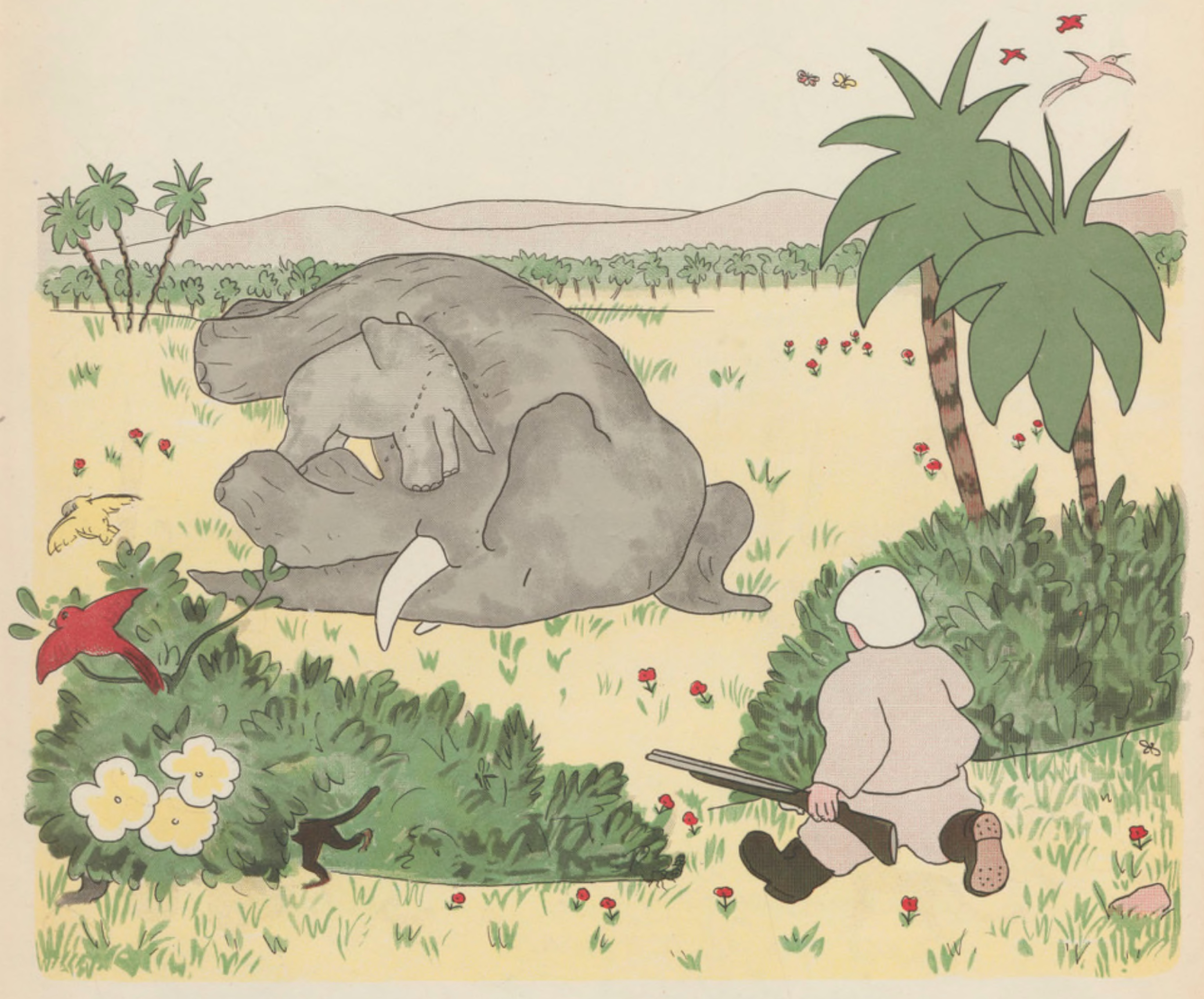 Histoire de Babar : le petit éléphant / Jean de Brunhoff Éditions du Jardin des modes (Paris)